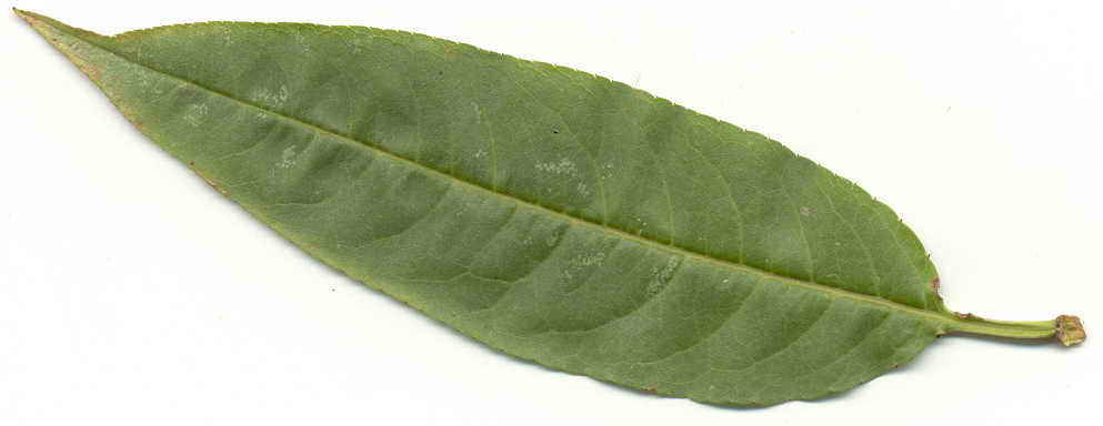 Escaneada